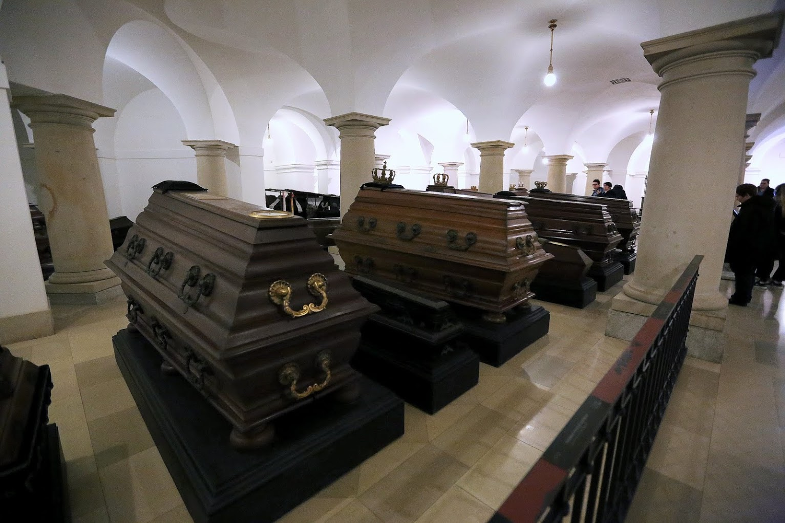 Berlini dóm altemploma